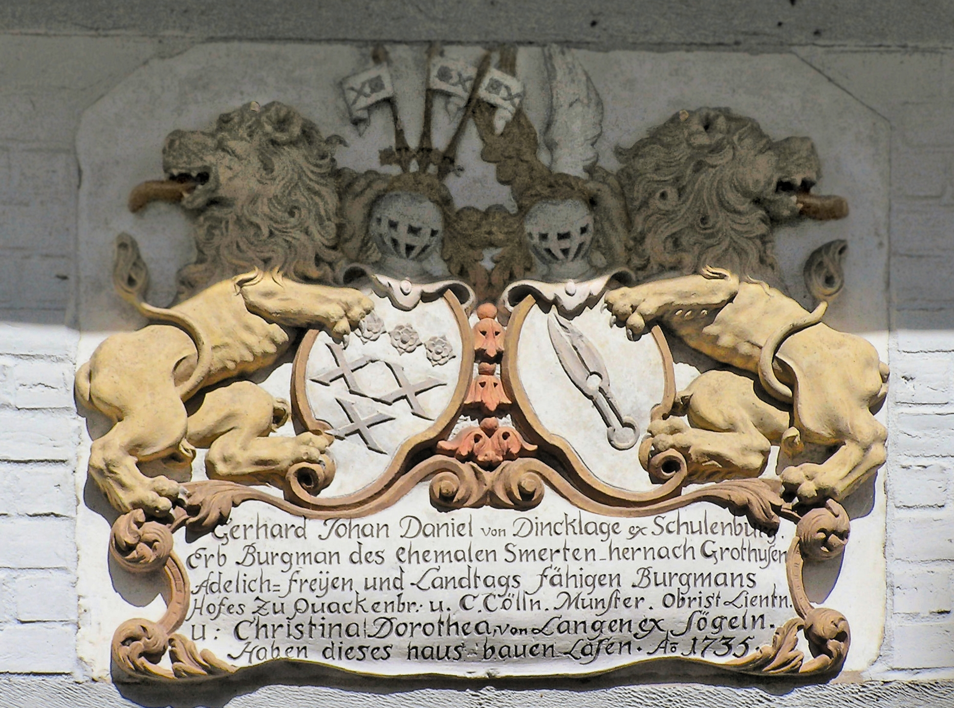 Quakenbrück, Dincklage-Wappen (Burgmann)